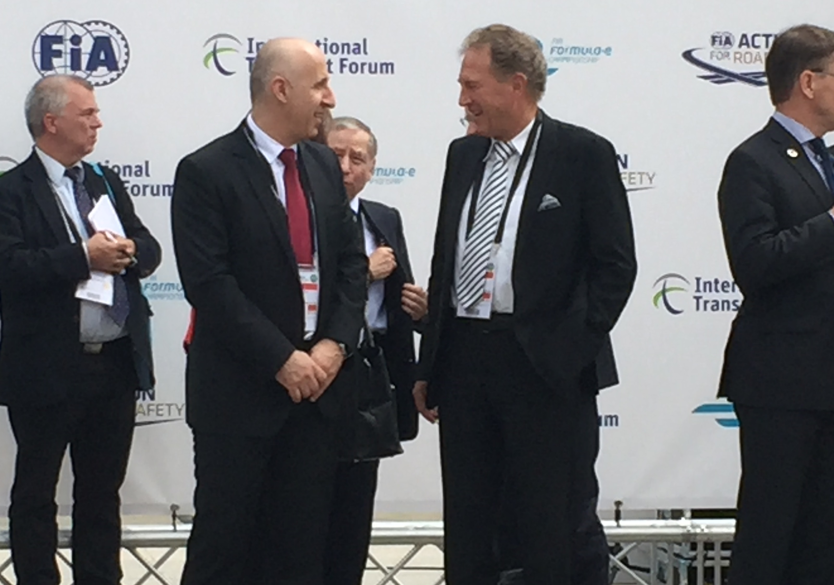 Cu secretarul de stat german pe transporturi, la International Transport Forum- ITF Leipzig, discutând despre vehicule electrice și autonome